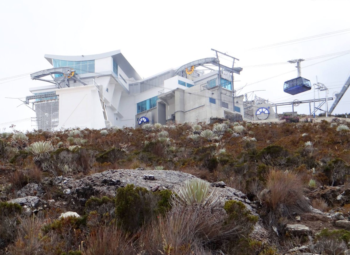 teleférico de Mérida (mukumbari), parque nacional sierra nevada, andes de Venezuela, en febrero de 2017 13